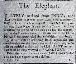 The Elephant. Ankündigung für eine Ausstellung des ersten Elefanten auf amerikanischem Boden.